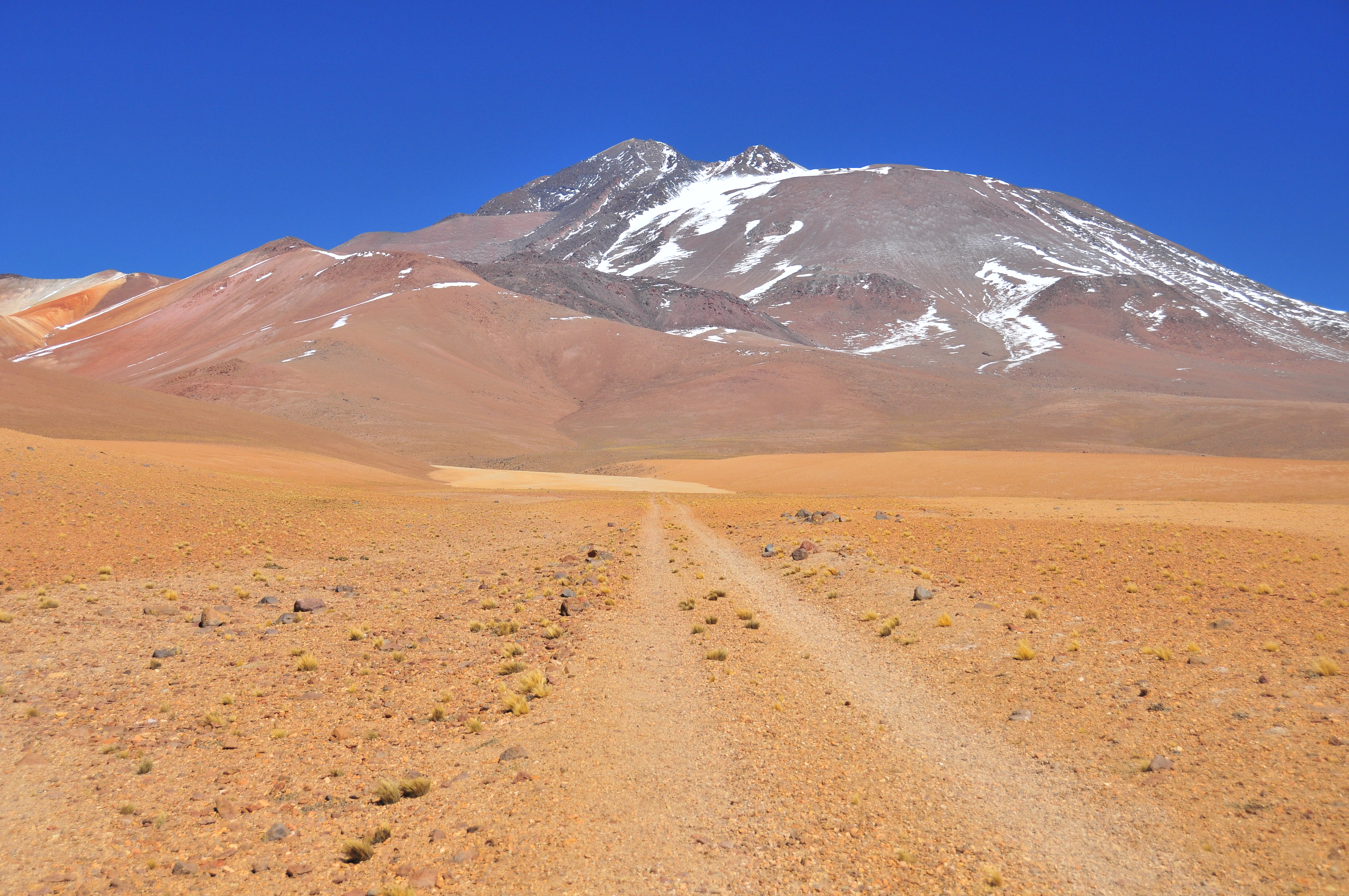 Vista de los bofedales al interior del Parque Nacional Llullaillaco